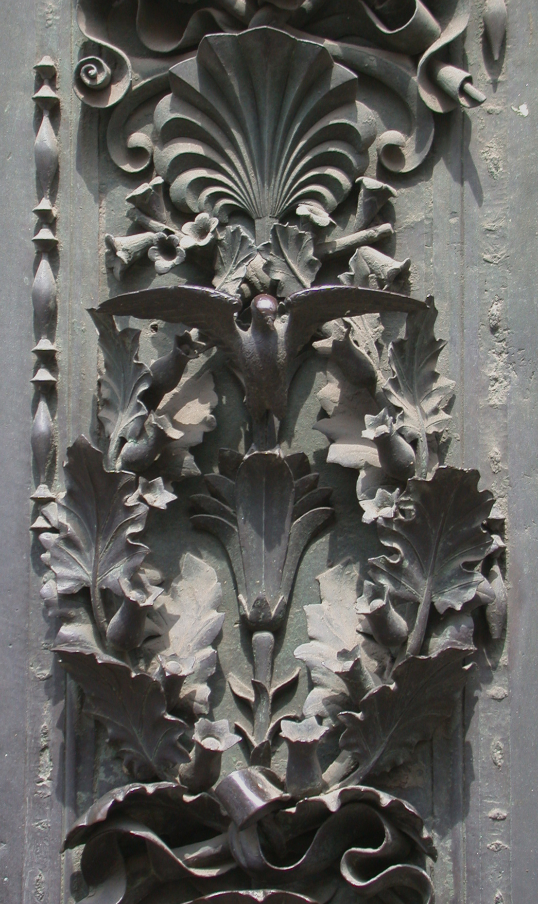 Firenze, Battistero di San Giovanni Battista, porta sud di Andrea Pisano, particolare della decorazione di uno stipite. Foto personale aprile 2005.